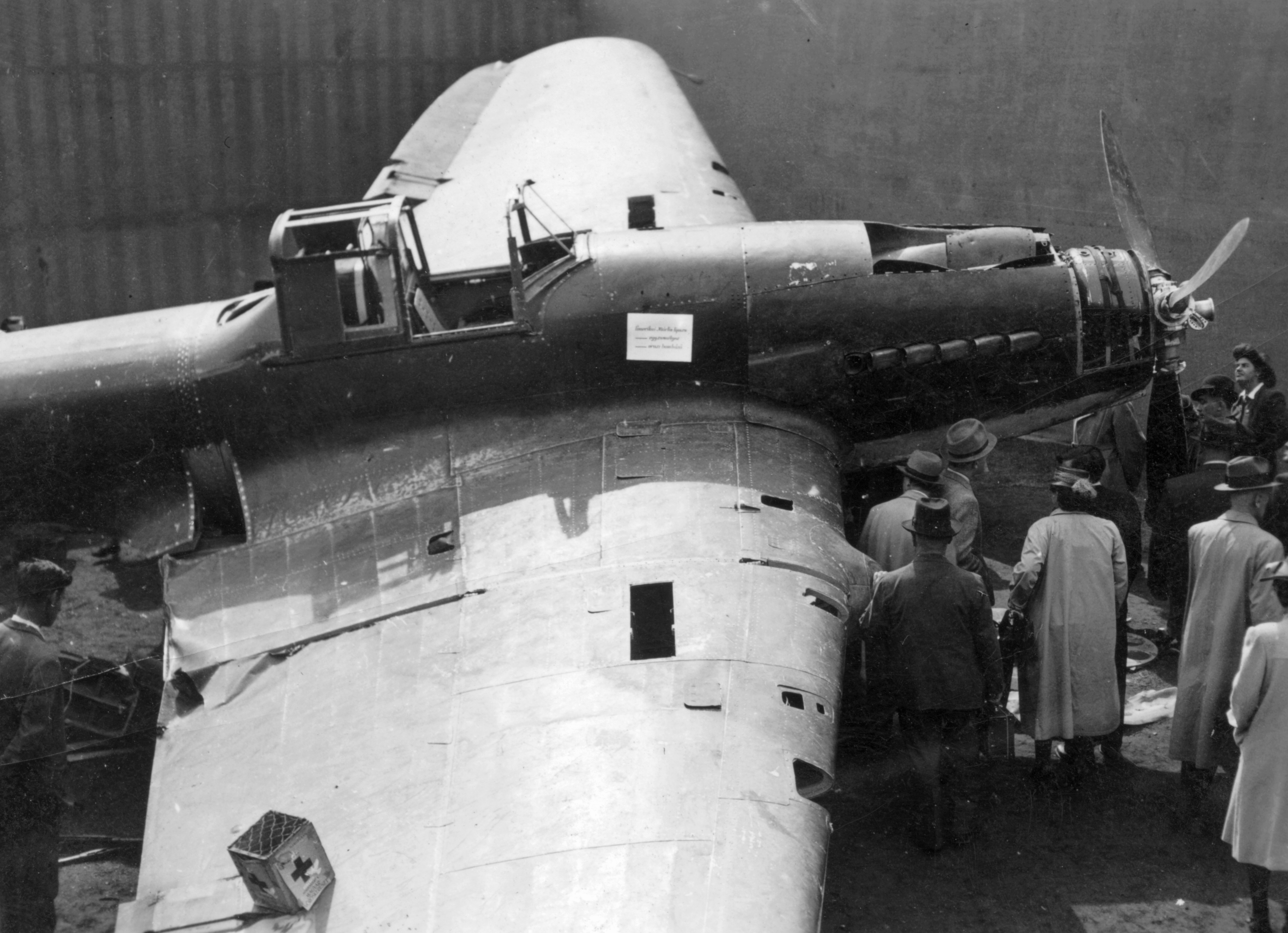 zsákmányolt szovjet IL-2 Sturmovik csatarepülőgép roncsa az 1942.-es Nemzetközi Vásáron. Location: Hungary, Budapest XIV. Tags: airplane, Ilyushin-brand, Soviet brand, second World War, transport, fair, wreck, Budapest Title: zsákmányolt szovjet IL-2 Sturmovik csatarepülőgép roncsa az 1942.-es Nemzetközi Vásáron.